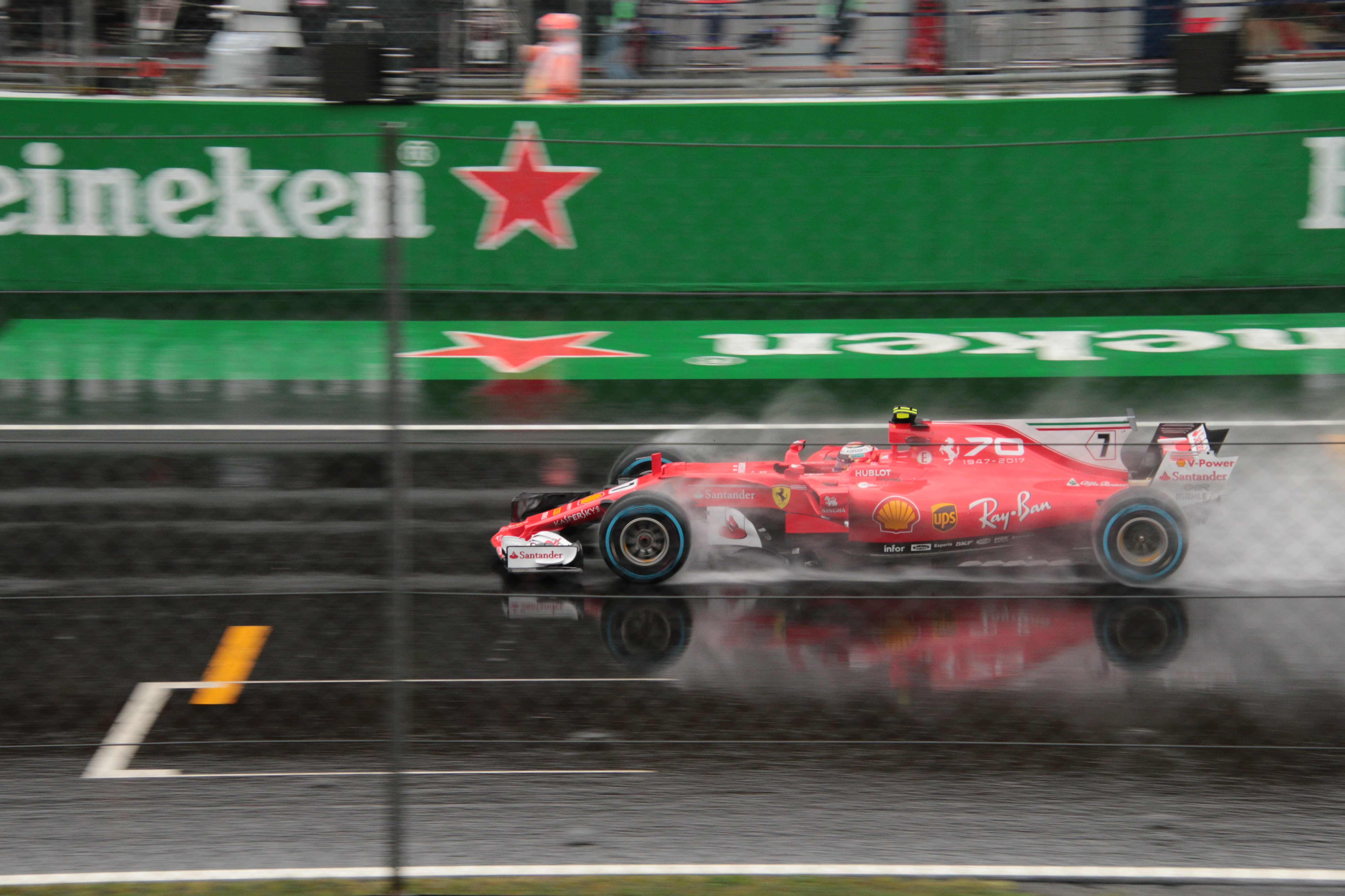 ２時間待つとか思ってませんでした